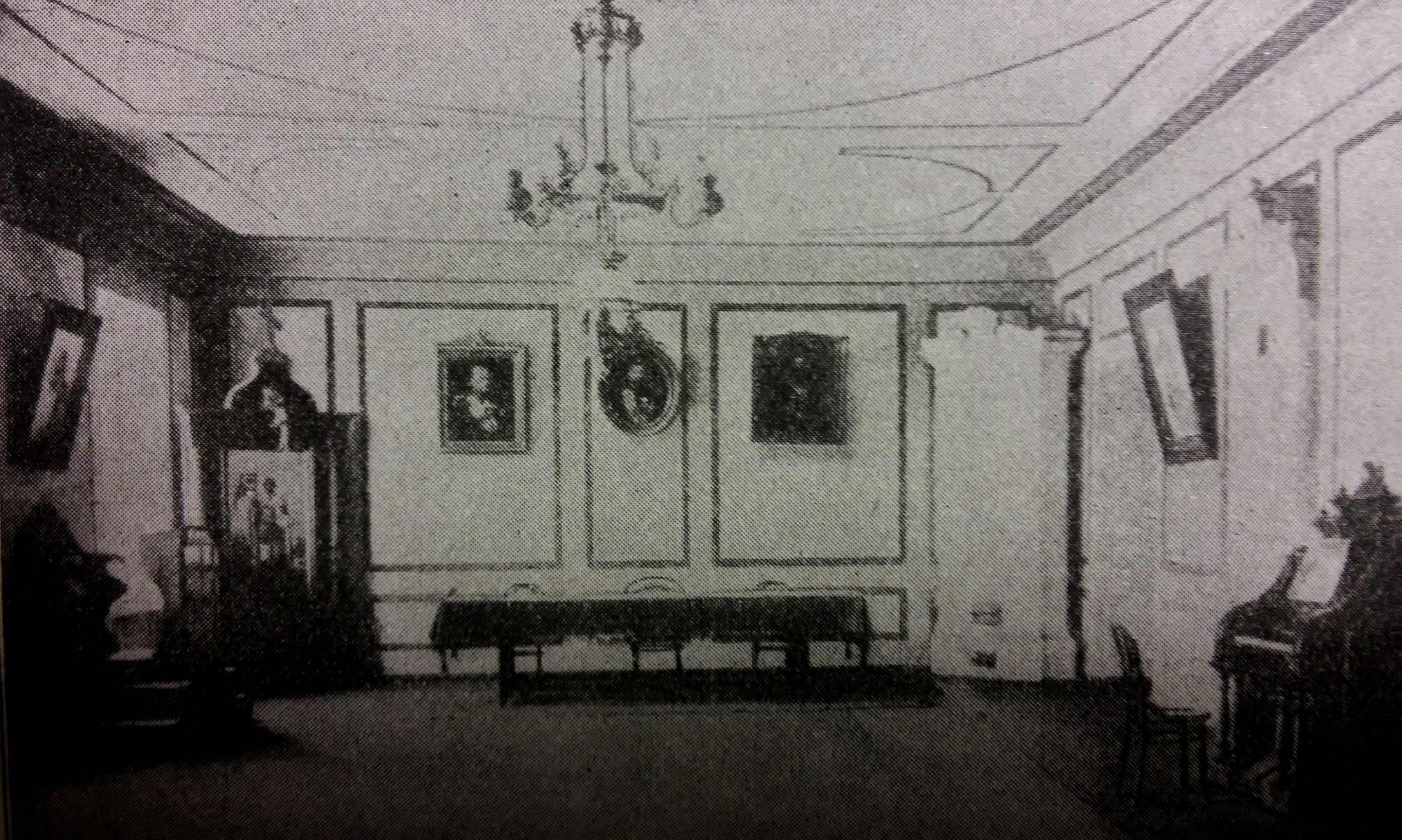 Aula seminarium duchownego w Chełmie